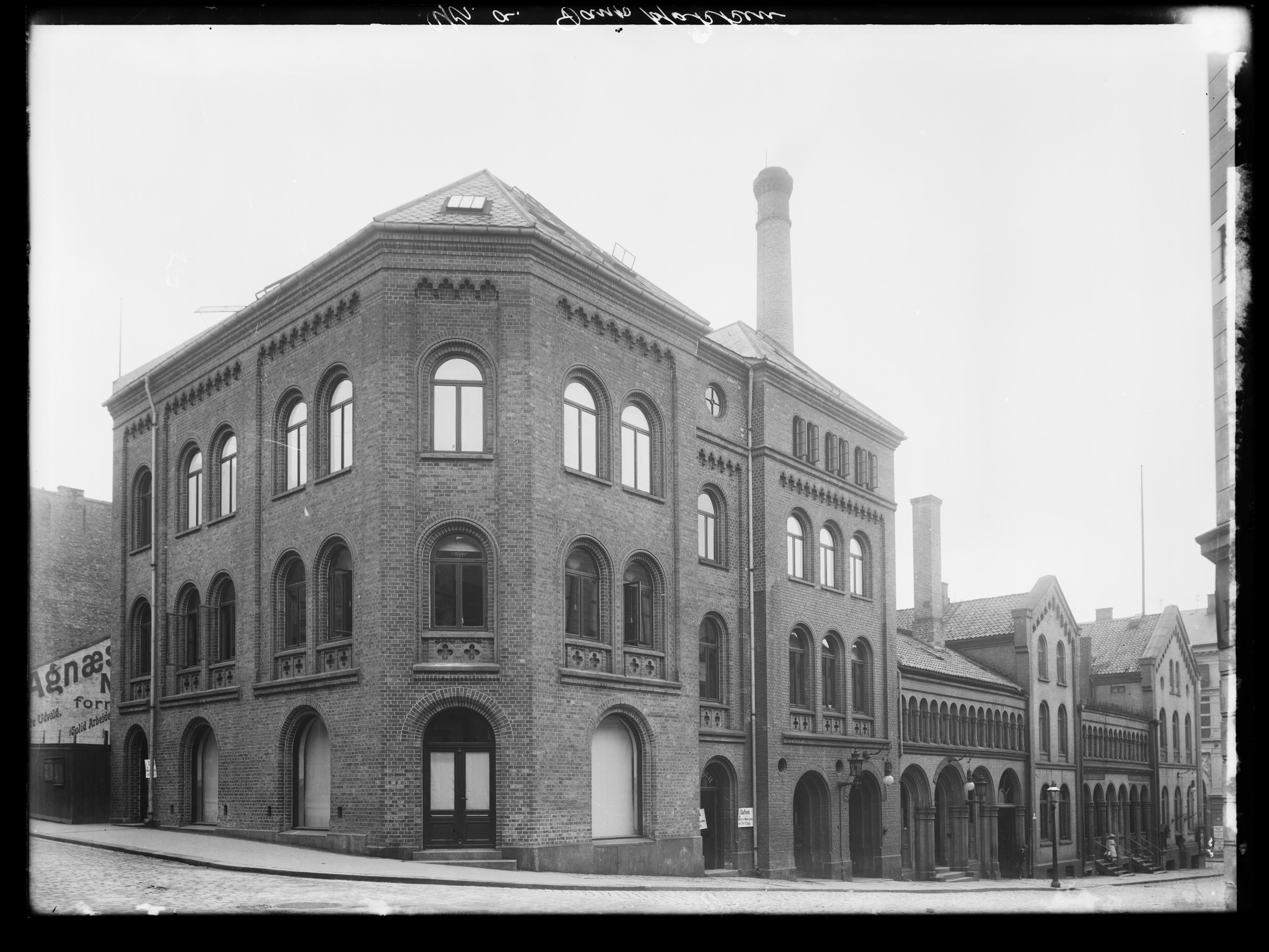 Bildet er hentet fra Nasjonalbibliotekets bildesamling. Anmerkninger til bildet var: Påskrift arkivark: Kr.a. Dampkjøkken Eldste arkivnummer: 360 Yngre arkivnummer: 88, 33 [usikker datering] Oslo, Oslo, Oslo